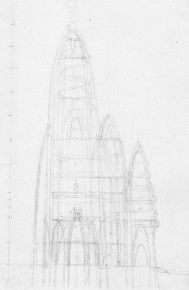 Sección del Hotel Atracción.